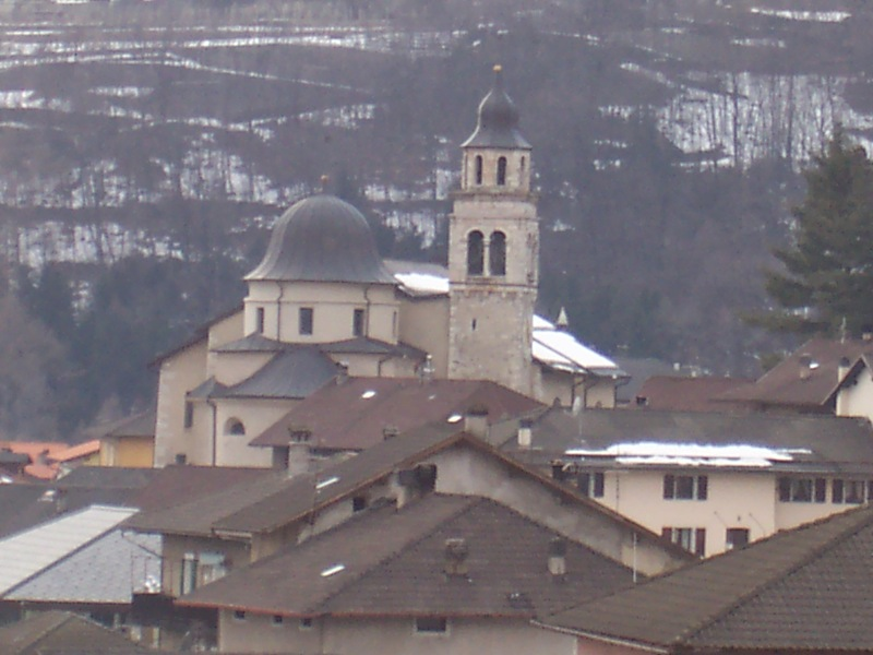 Eglise Ste Marie de l'Assomption